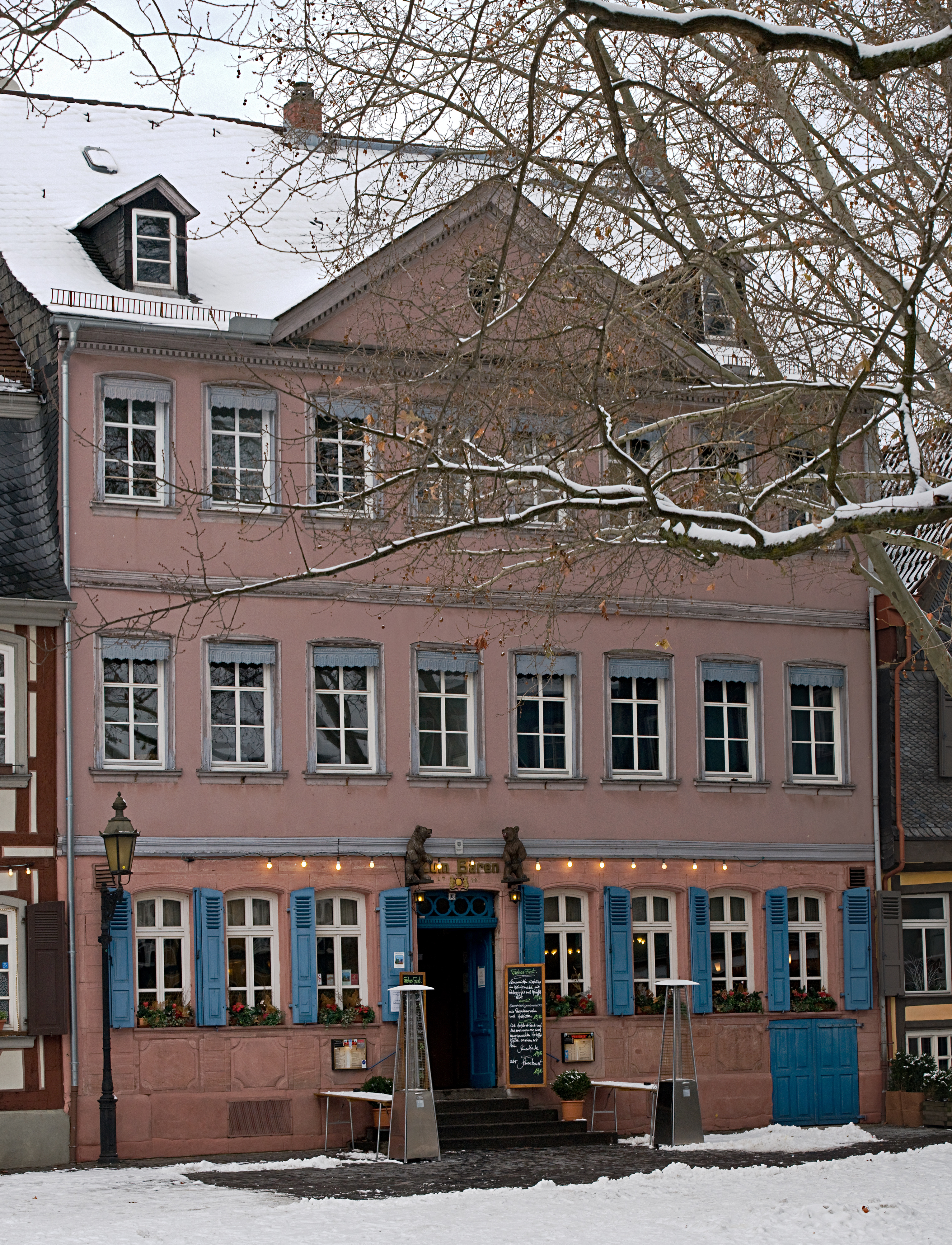 Höchster Schloßplatz 8 Gaststätte Zum Bären